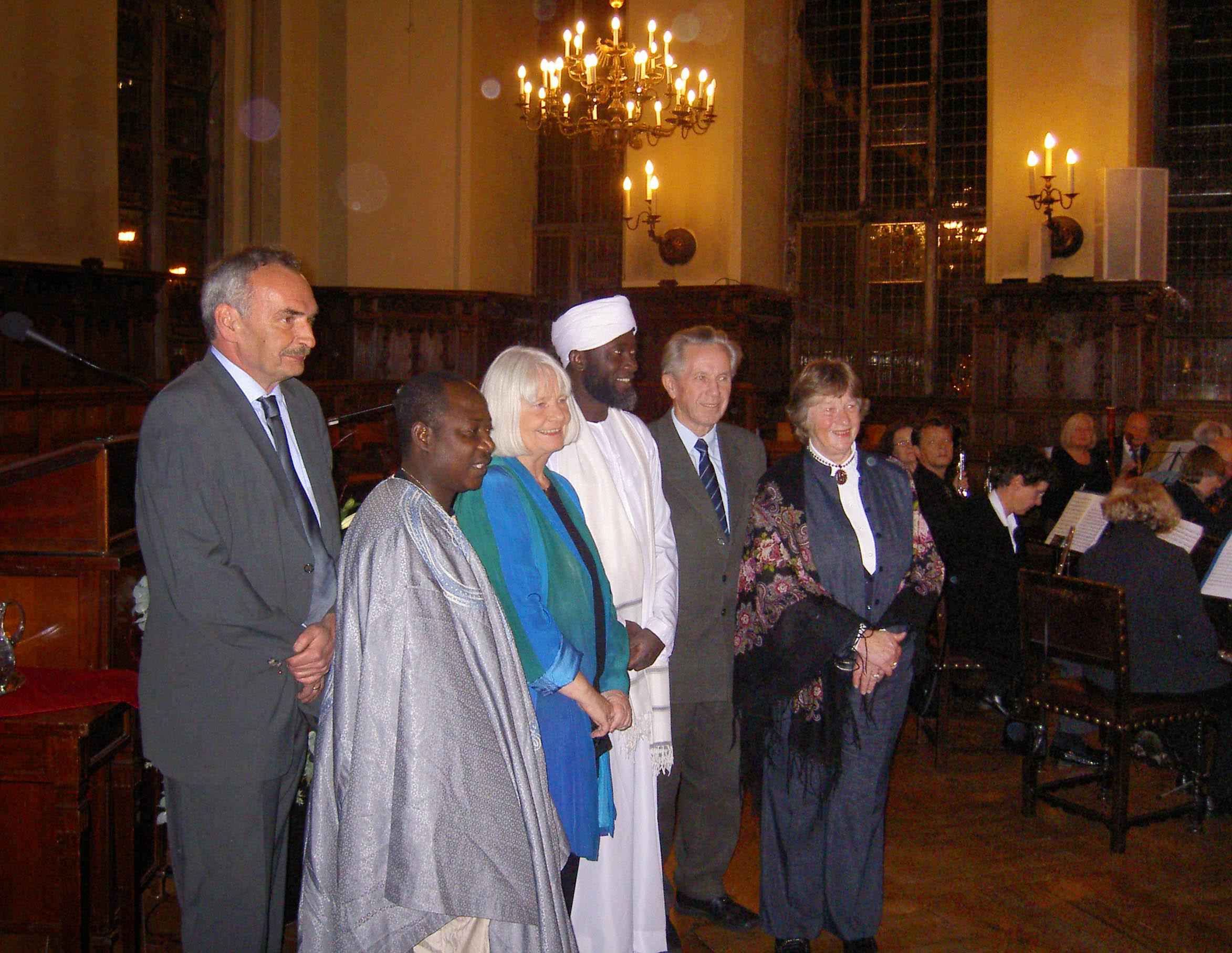 Gewinner des Bremer Friedenspreises 2005